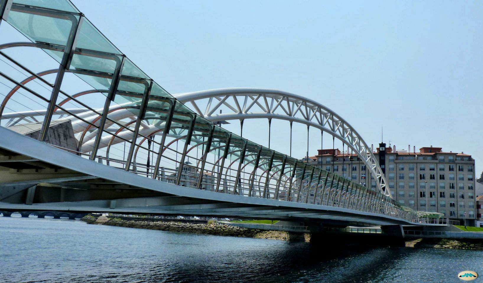 Pontevedra-Ponte das correntes-132